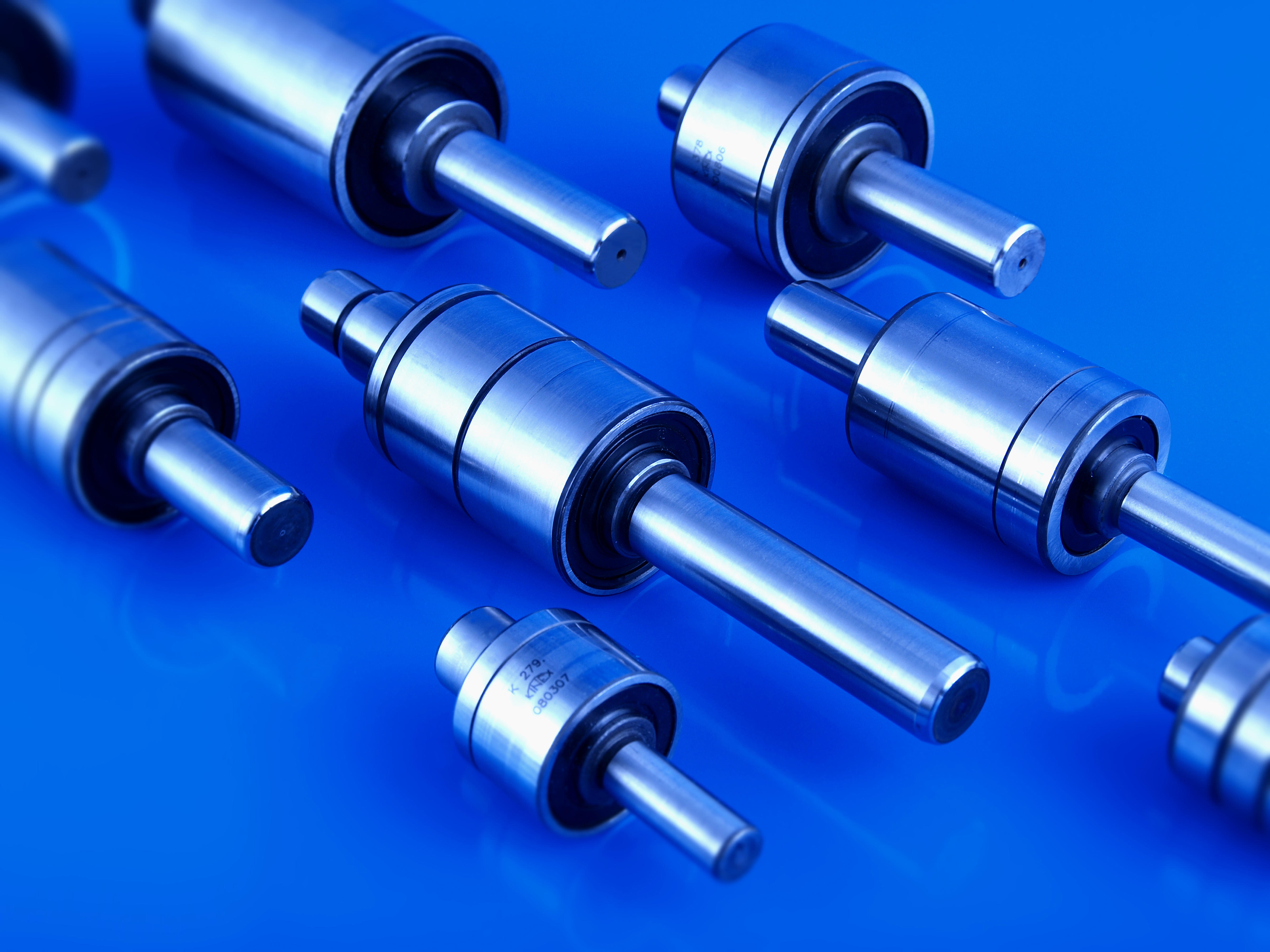 Ložiská do vodných čerpadiel